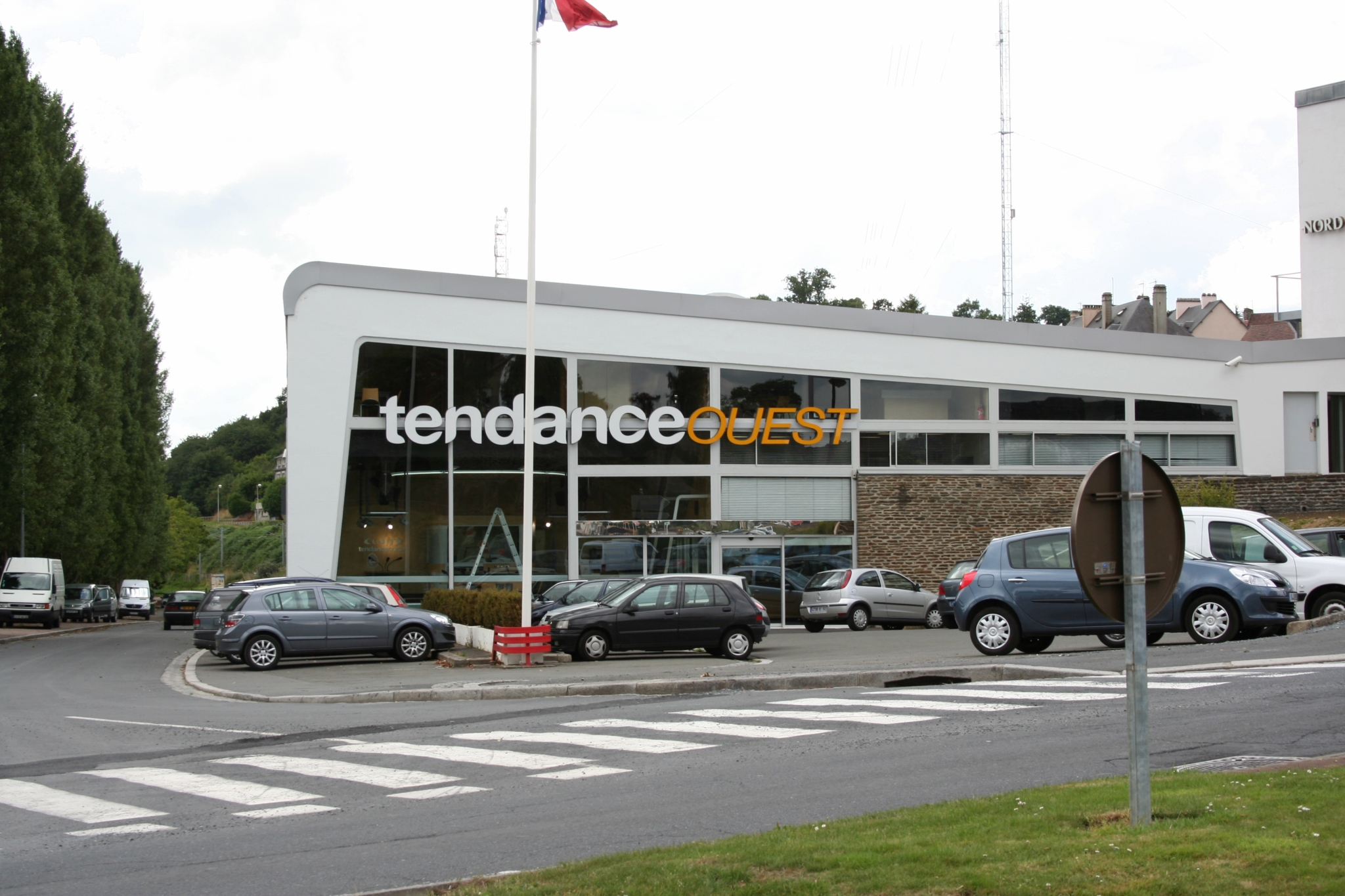 Facade de la radio française Tendance Ouest - Saint-lô - France